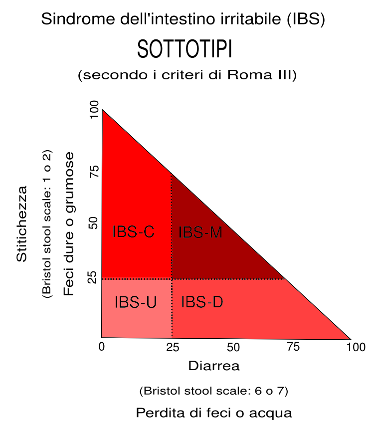 Nel grafico è possibile individuare bimensionalmente le quattro presentazioni note della Sindroem dell'Intestino Irritabile (IBS), e il ruolo della consistenza delle feci in percentuale nei tipo 1 e 2 piuttosto che di tipo 6 e 7